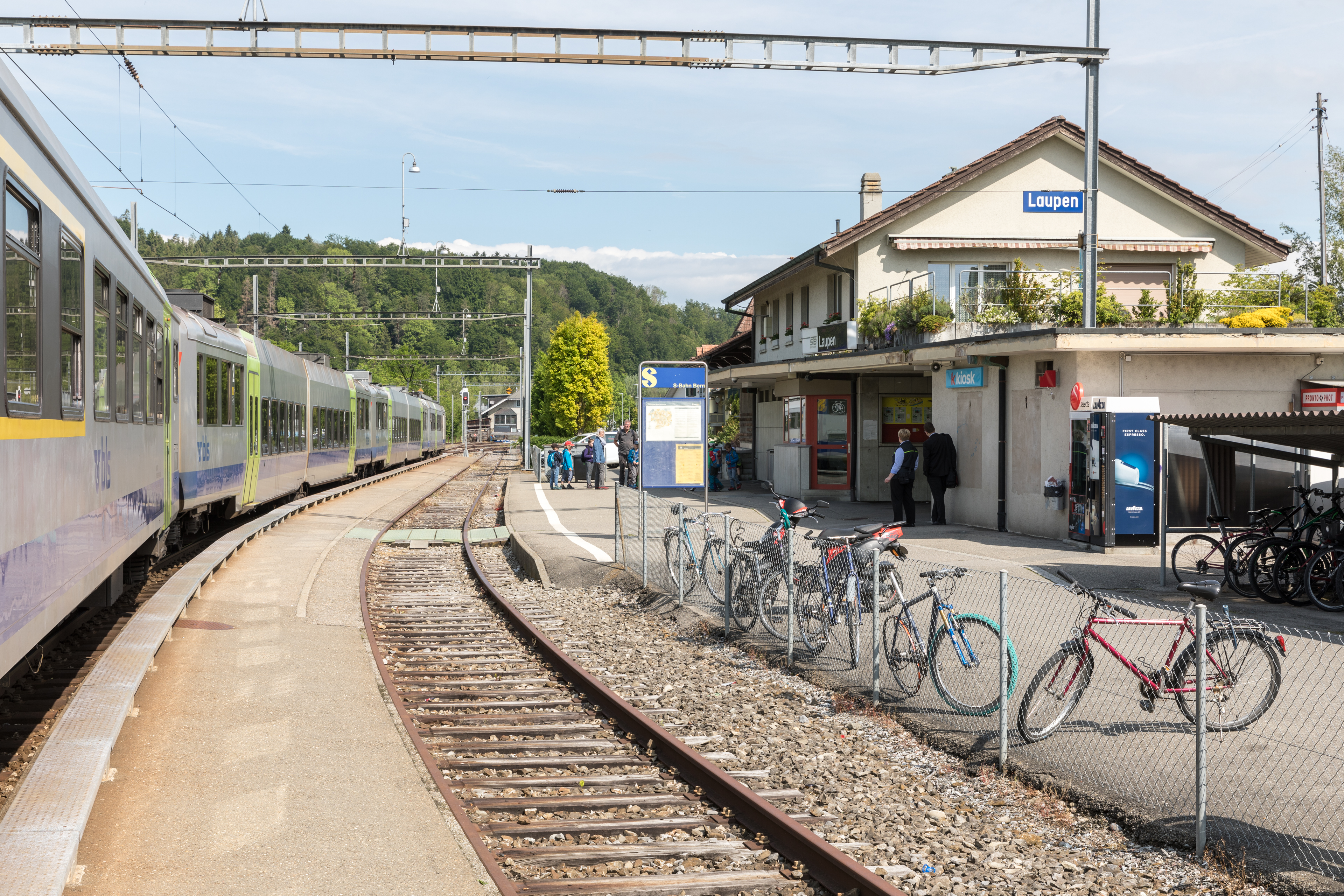 Endstation Bahnhof Laupen. Bis hierher führt das Gleis.